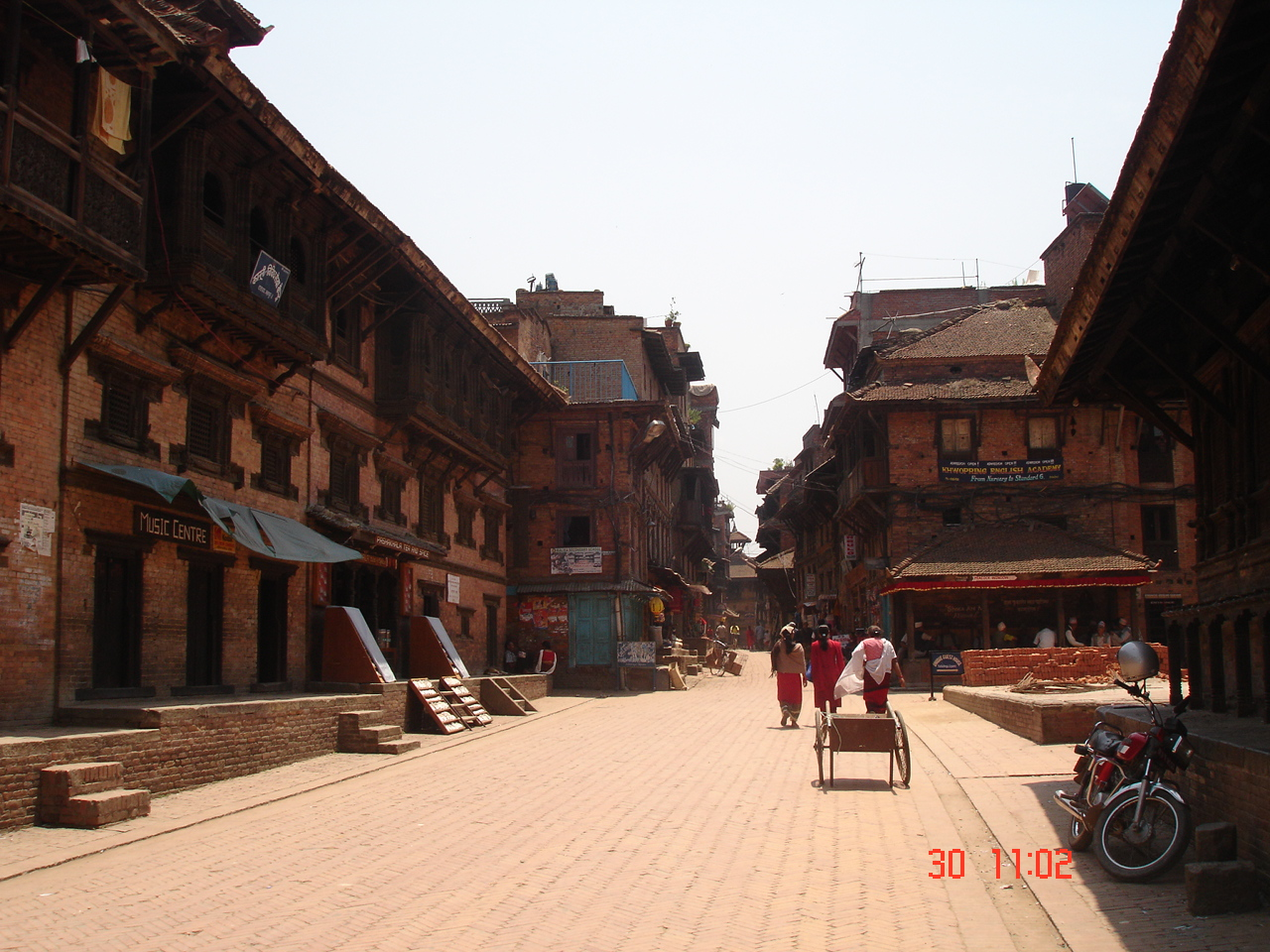 my photo skc